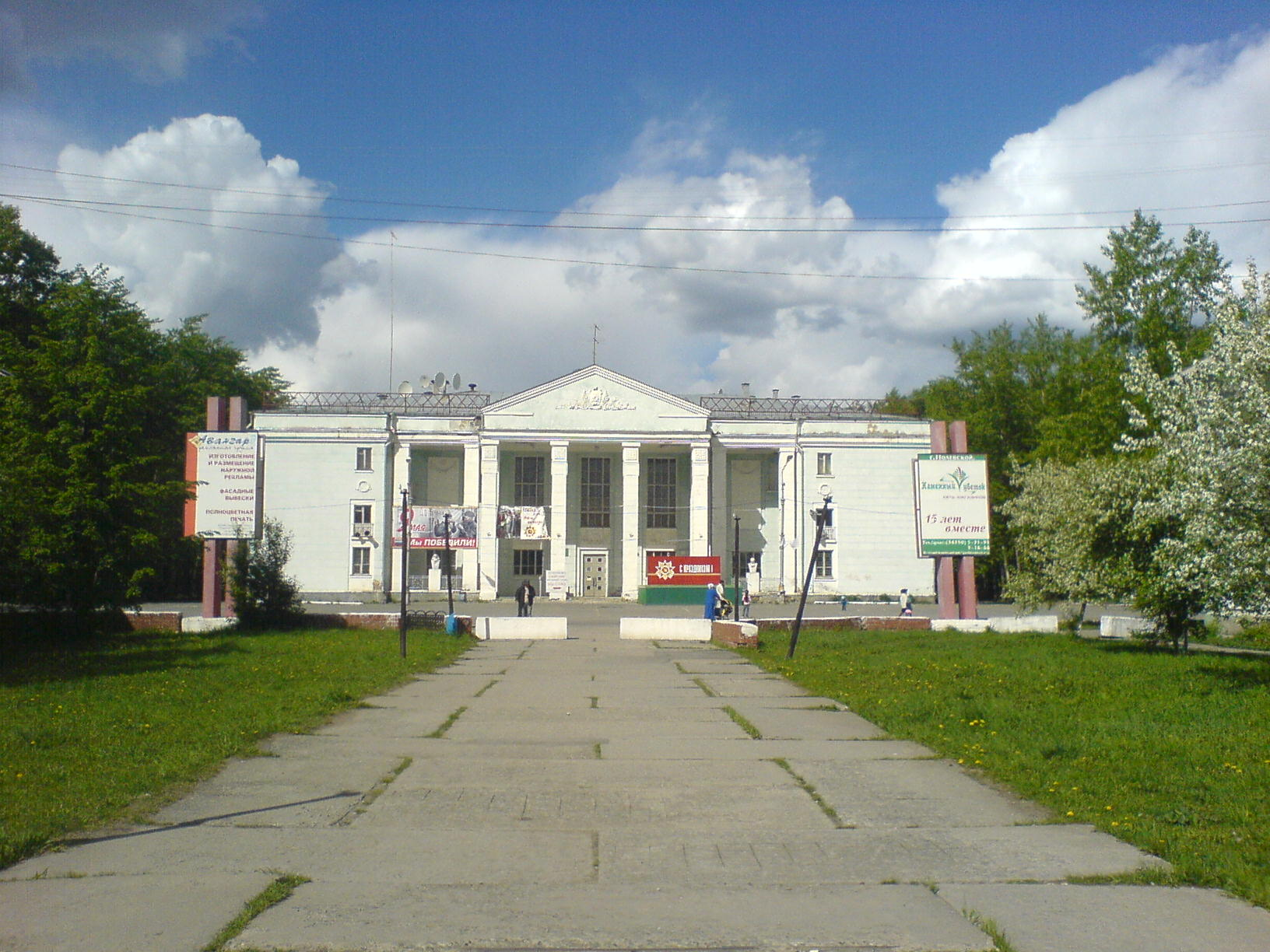 Здание дворца культуры в Полевском, 2009 год